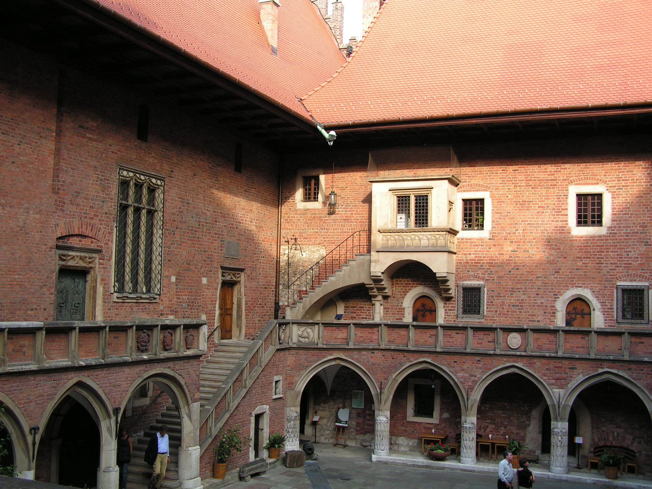 Collegium Maius, Kraków